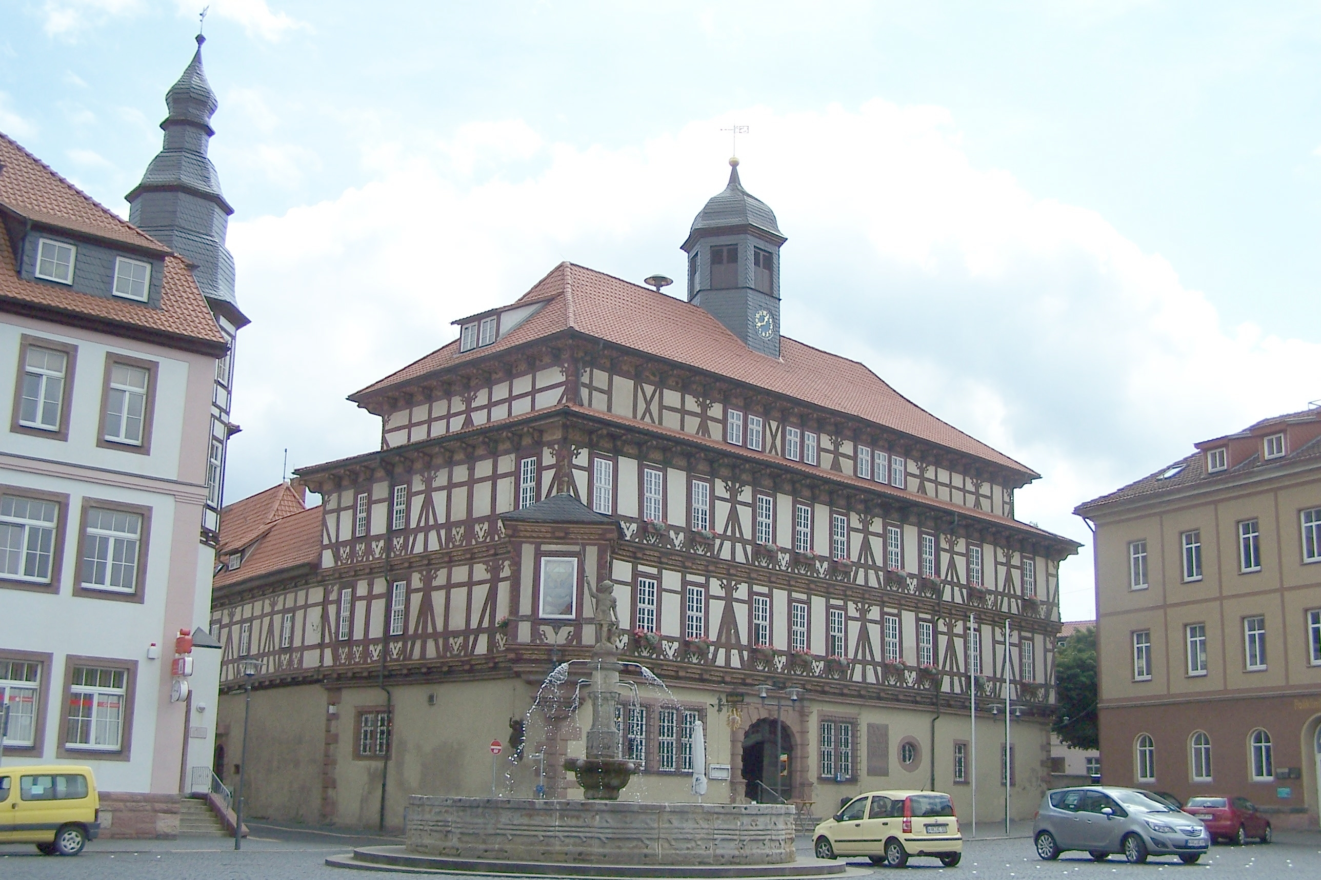 Ansichten und Details zum Haus Widemark, heute Rathaus der Stadt Vacha.